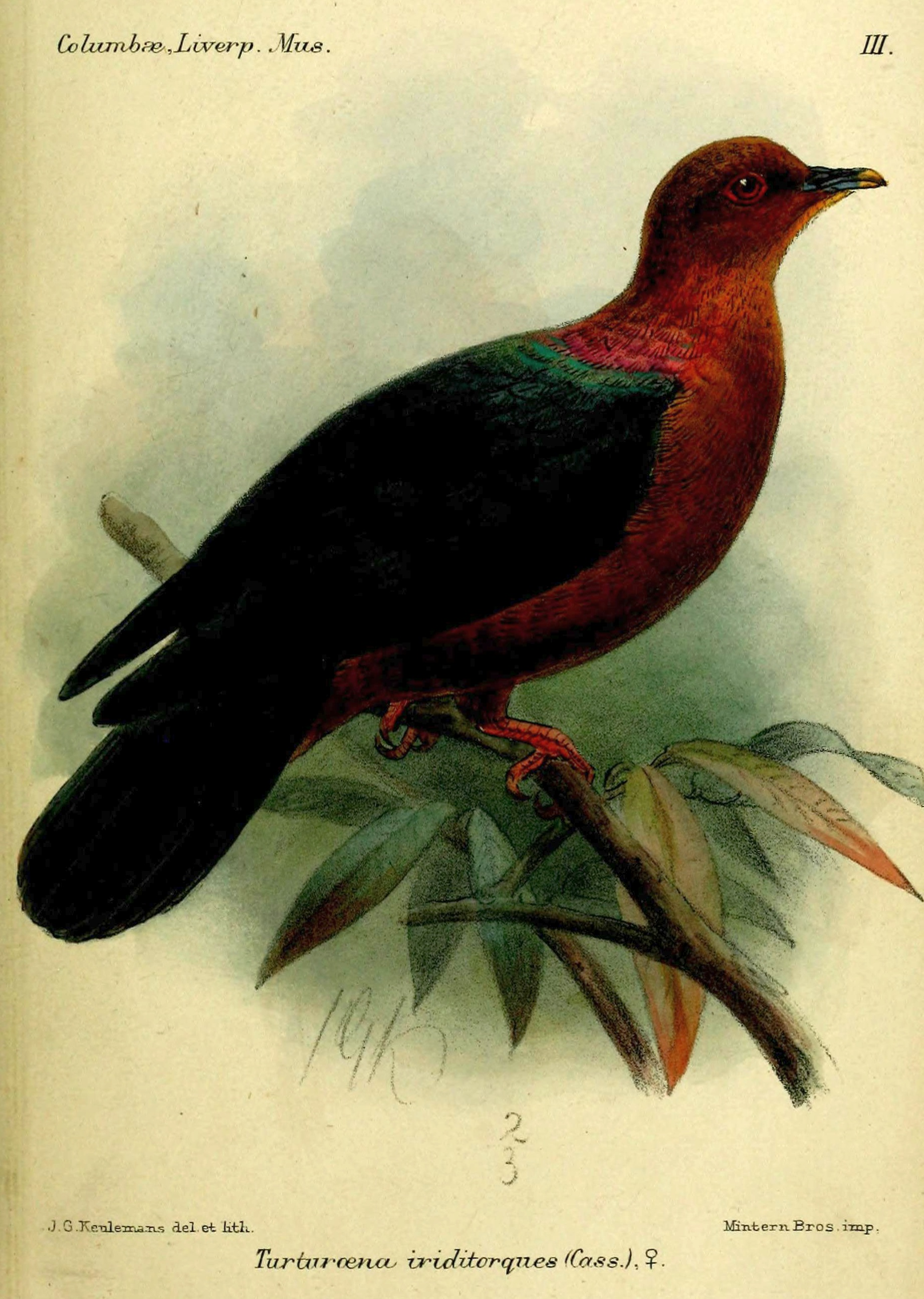 Turturoena iriditorques Female